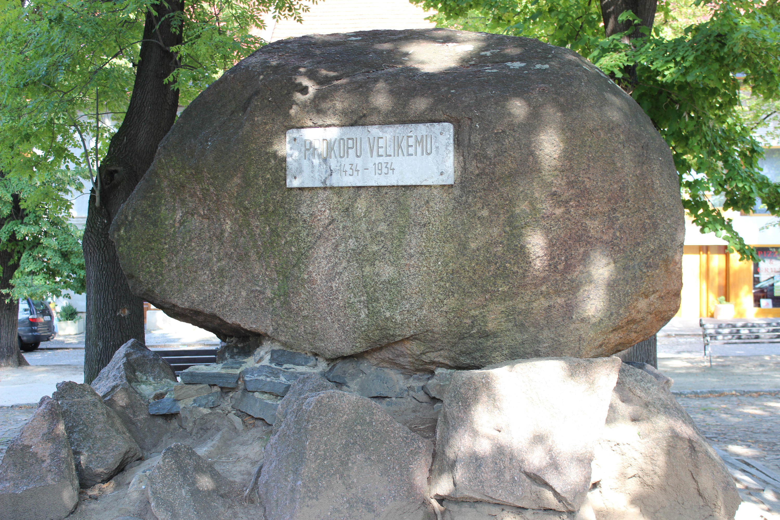 Kouřim, Mírové náměstí, památník husitského vojevůdce Prokopa Holého.